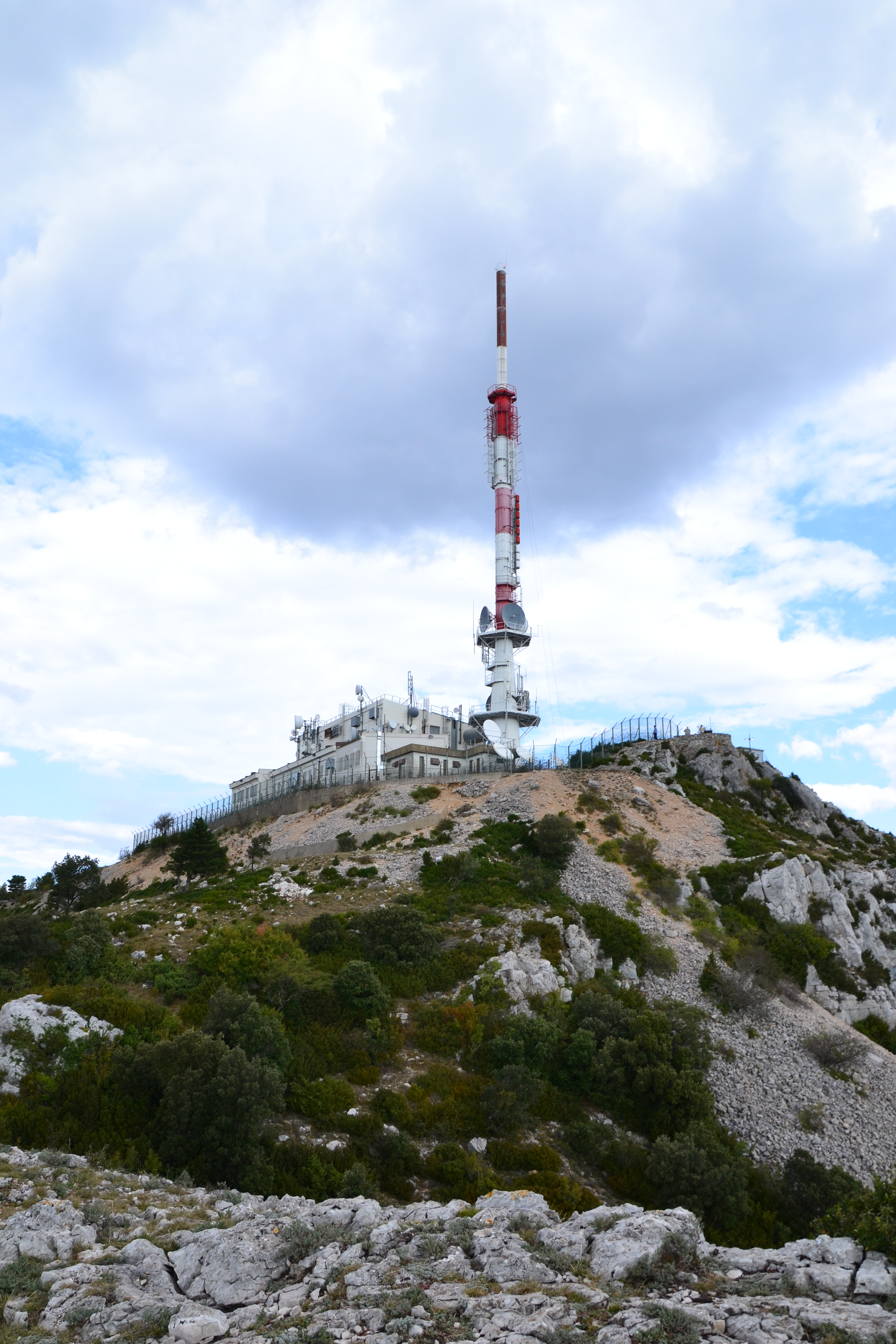 Sommet du Mont Saint-Baudille surmonté d'un relais de télévision (Hérault (34)).